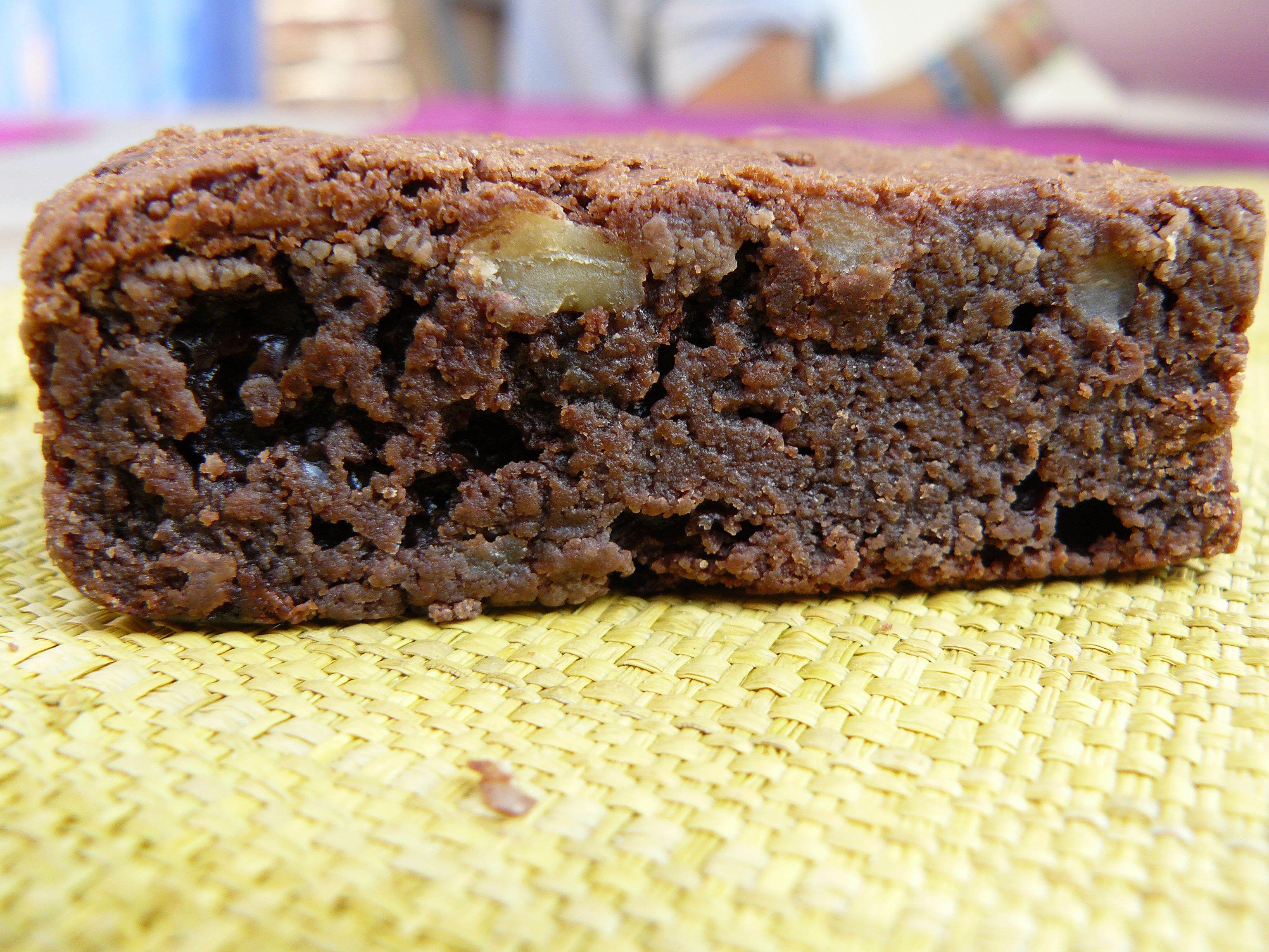 Allez, j’avoue c’est, attirée par le packaging que j’ai craqué pour ce brownie « prêt à manger » ! D’un autre côté pas la peine d’avoir une rubrique « test » si je ne teste rien ! Et pour le brownie j’ai MA testeuse sous la main.